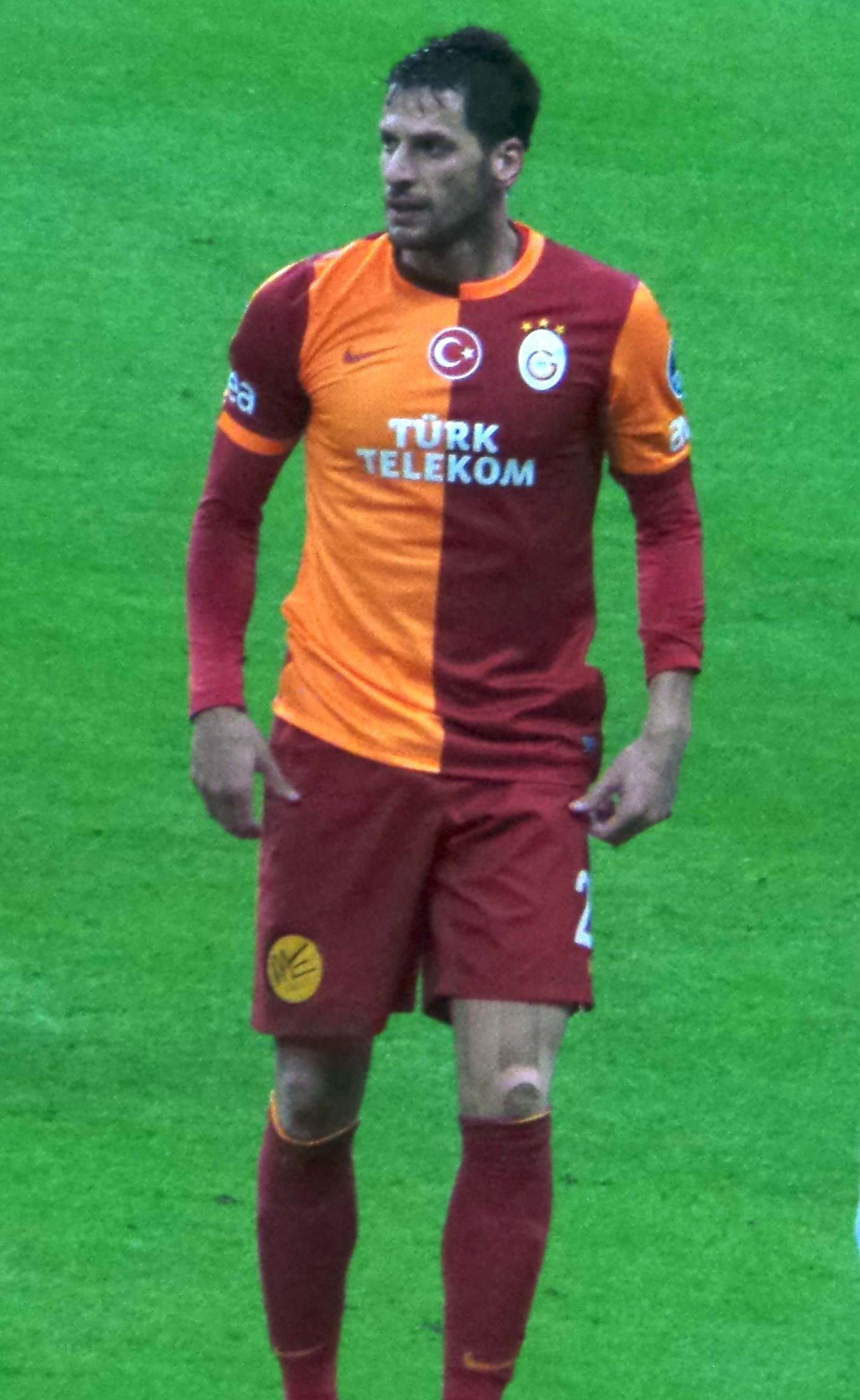 Hakan Balta with GS against Bursaspor